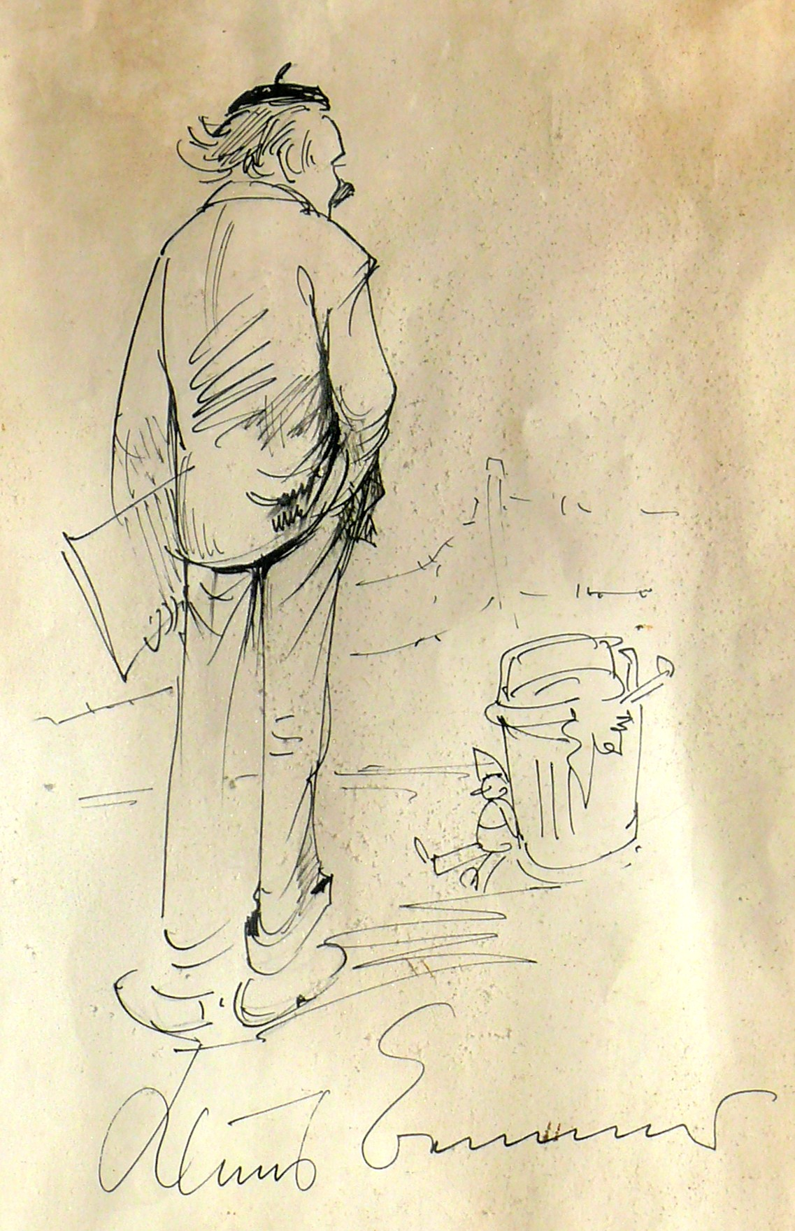 Selbstbildnis des Malers Klaus Bemmer